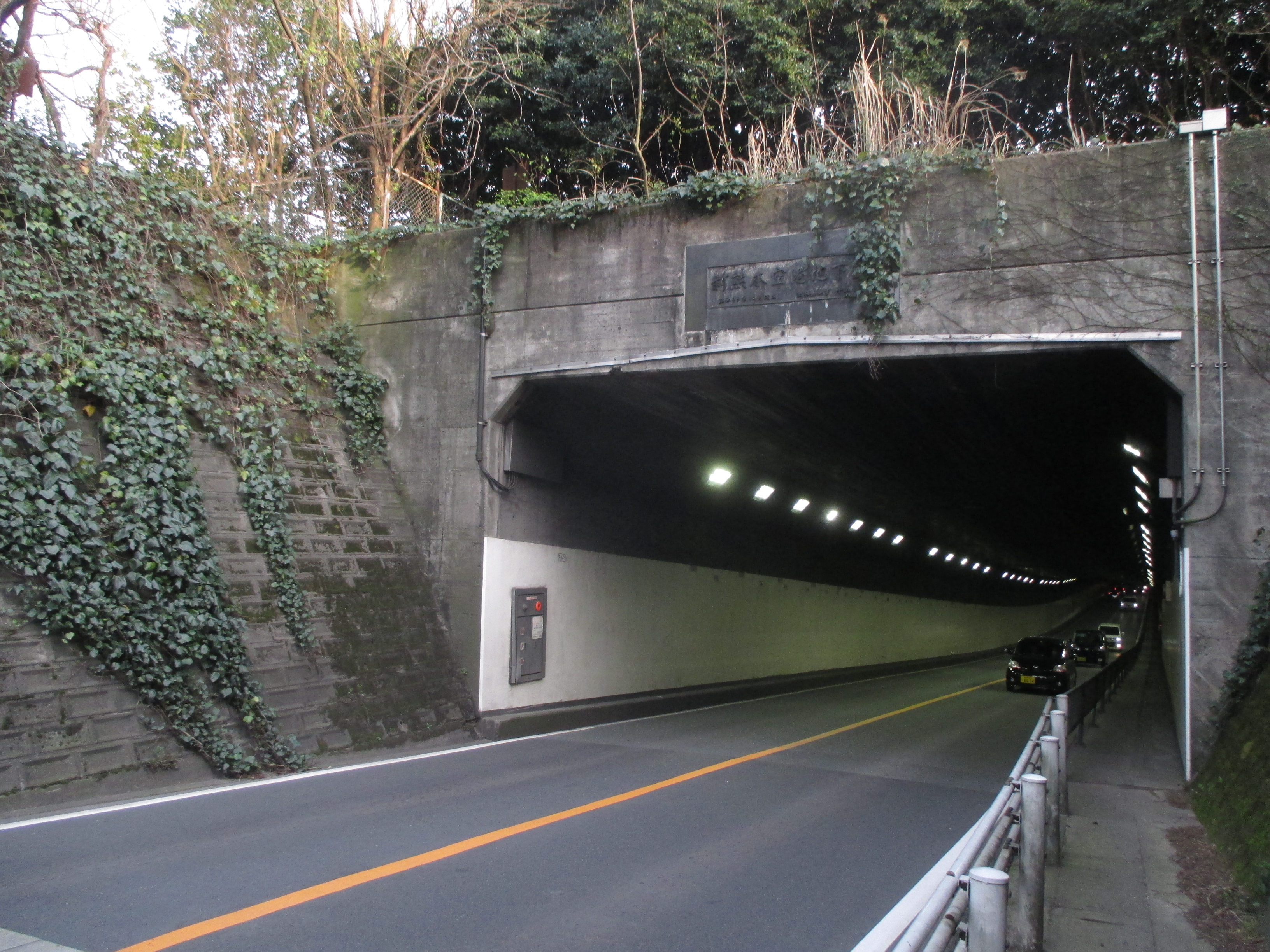 新熊本空港地下道 北側